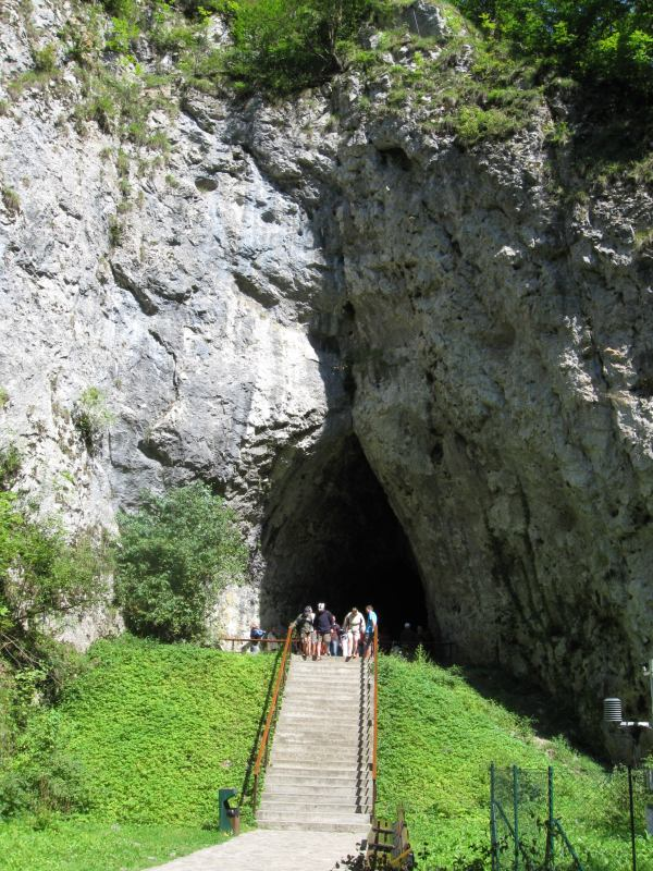 Suchý žleb - Kateřinská jeskyně